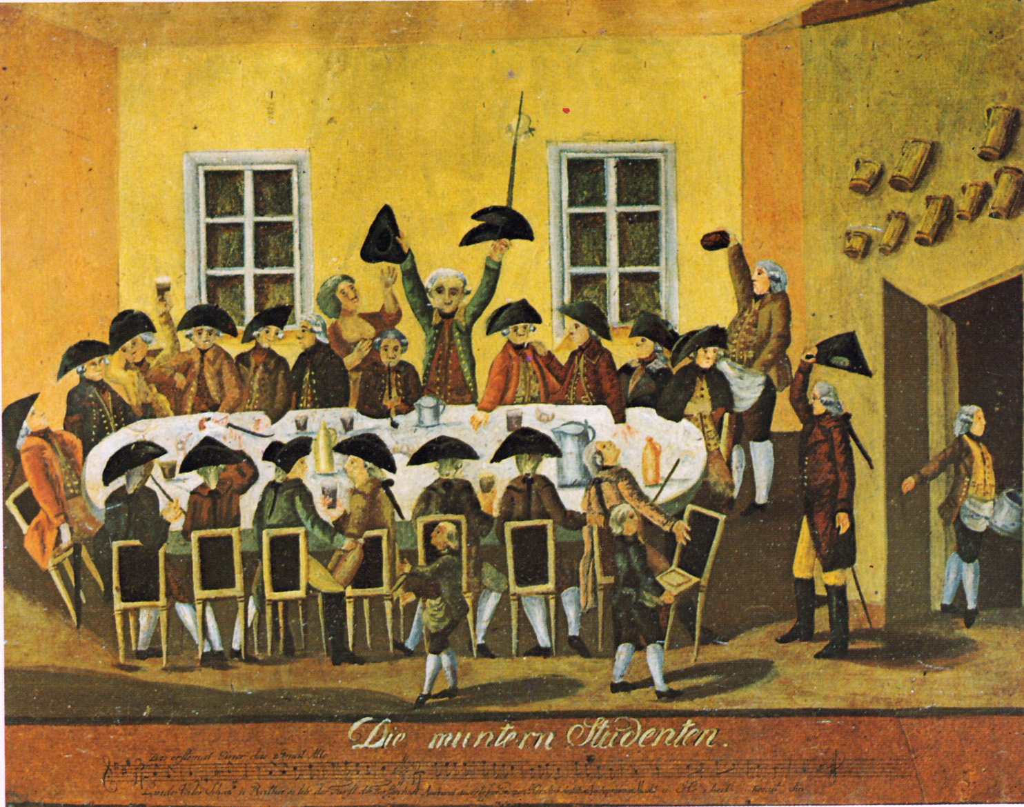 Studentische Kneipgesellschaft in Wien. Der anonym einkehrende Kaiser Josef II. zieht den Hut und wird erkannt. Die Studenten springen auf und durchbohren ihren Hut. Darunter die Beschriftung „Die muntern Studenten“ und das Lied „Landesvater, Schutz und Rater ...“. Auf der Rückseite ist diese von Dr. Krause veröffentlichte Karte beschriftet mit „Kaiser Joseph II. besucht 1788 in Wien-Währing einen Studentenorden, worauf ihm zu Ehren ein ‚Landesvater’ gestochen wird.“